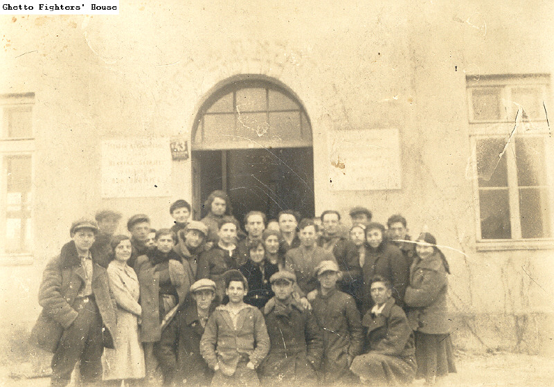 אנשי "החלוץ" בחזית הבניין ע"ש גבריאלה דוקטרוביץ' בגרוכוב